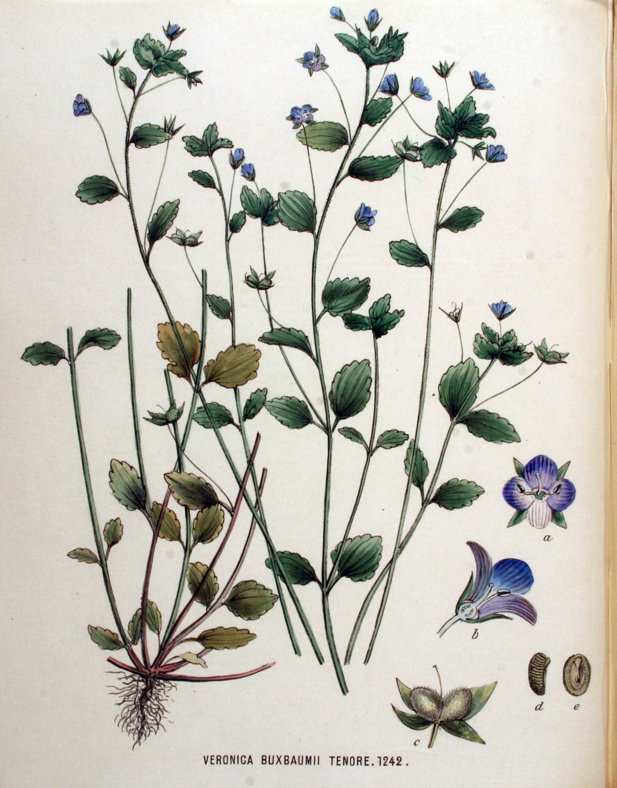 Veronica persica Poiret (Syn. Veronica buxbaumii Ten.))